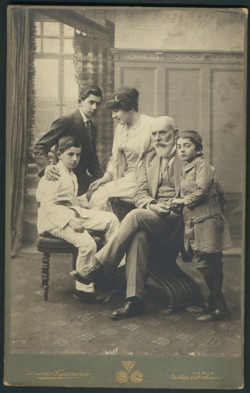 Димитър Карастоянов със семейството си.